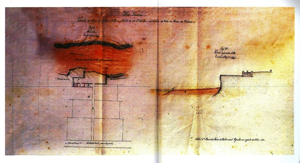 "Tombo do forte de S. João... na bahia da Vila da Praia da Victória", Ilha Terceira (Açores), Portugal.